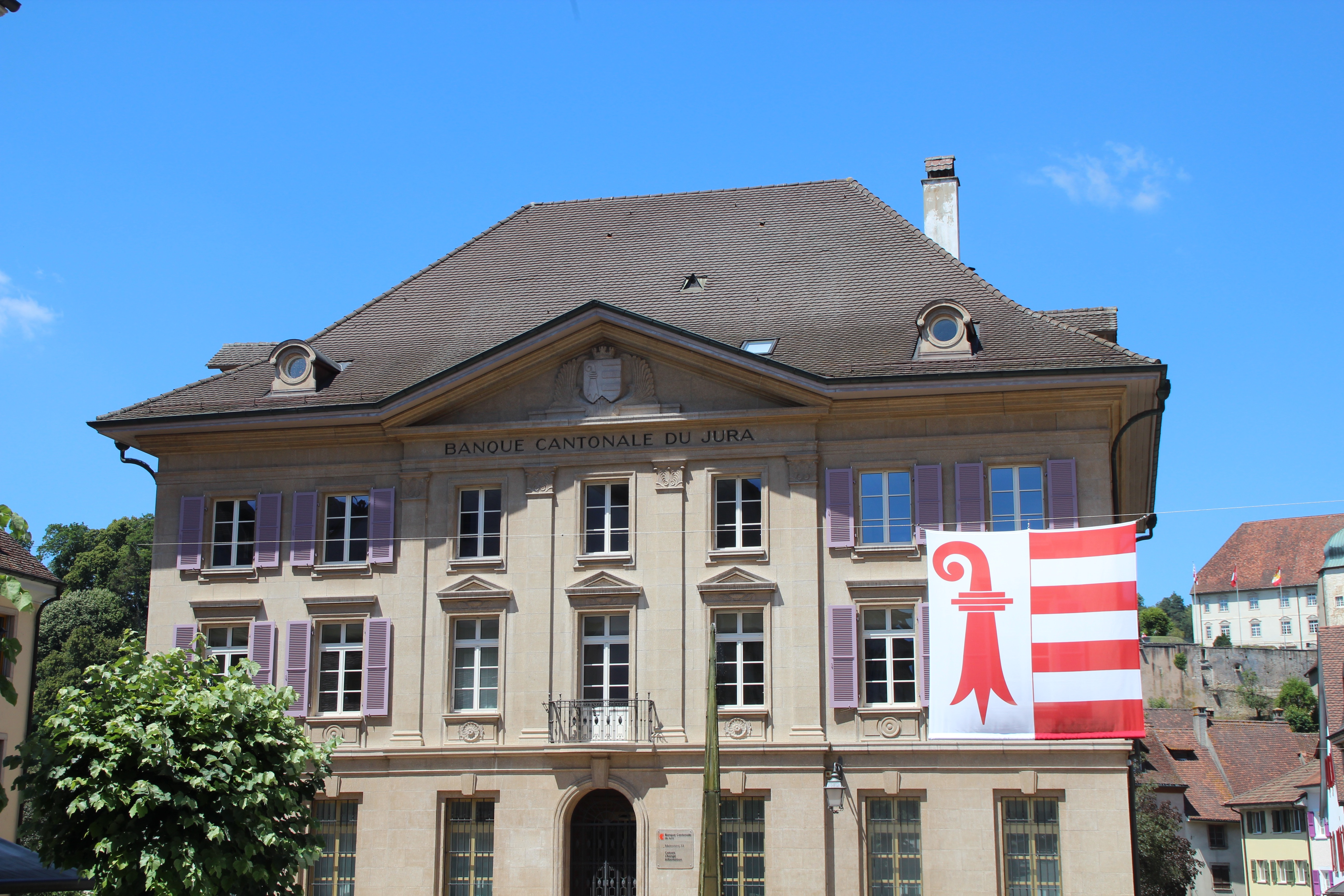 Banque Cantonal du Jura in Porrentruy